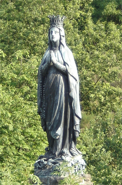 Schwaarz Muttergottesfigur zu Esch-Sauer. Allgemenges zum Bild: Dëst Bild weist déi Schwaarz Muttergottesfigur zu Esch-Sauer.